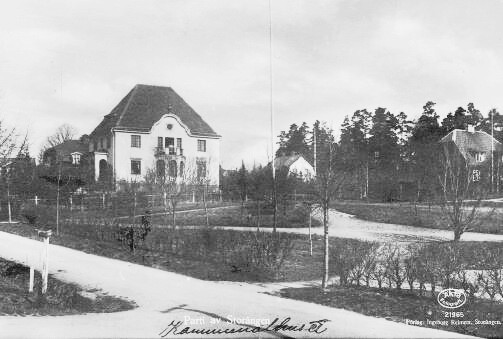 Storängen, Lindvägen, Villa Jacobsen (Villa Lockshall), Nackas kommunkontor